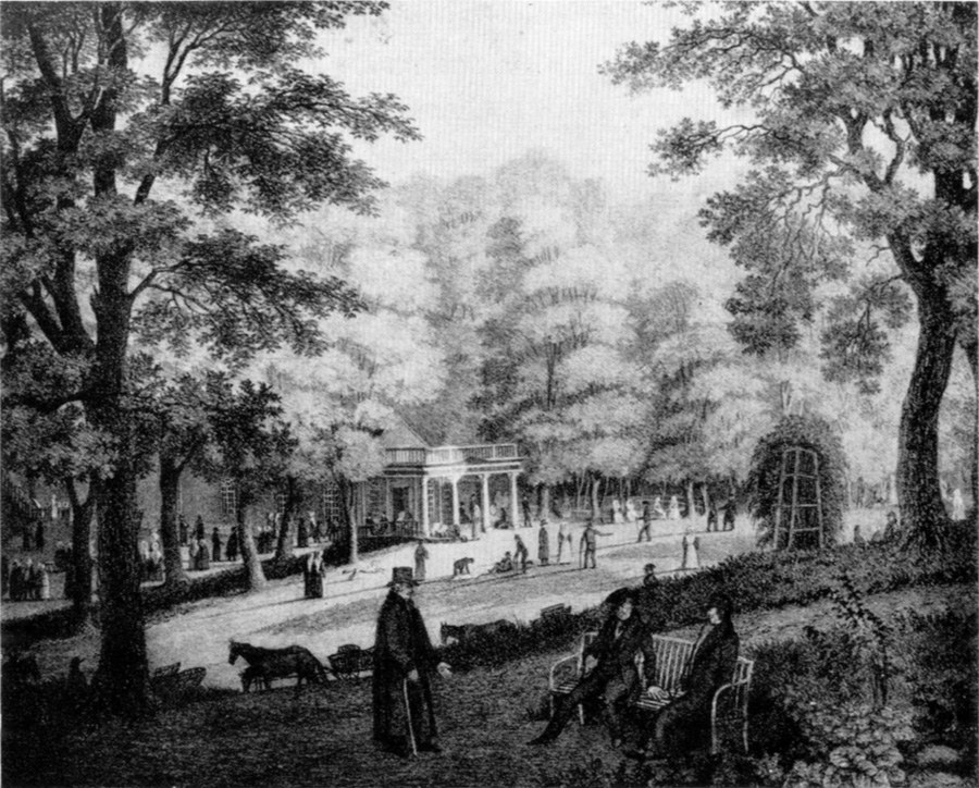 Ramlösa brunn. Akvatintetsning av C.F. Akrell 1823 efter en teckning av W.M. Carpelan 1816.